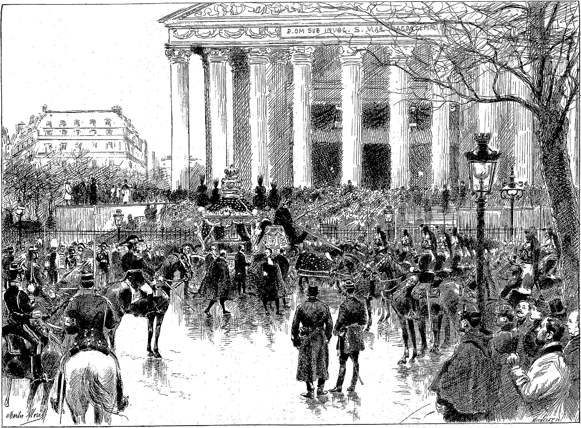 Paris. — Funeráilles de Dom Pedro II, Empereur de Brésil. — (Dessin d'après nature, de M. Charles Morel.).